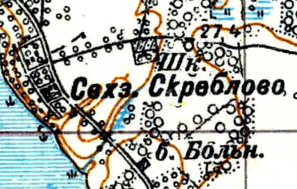 Топографическая карта Ленинградской области, квадрат Vc-29 (Батецкая), деревня Скреблово